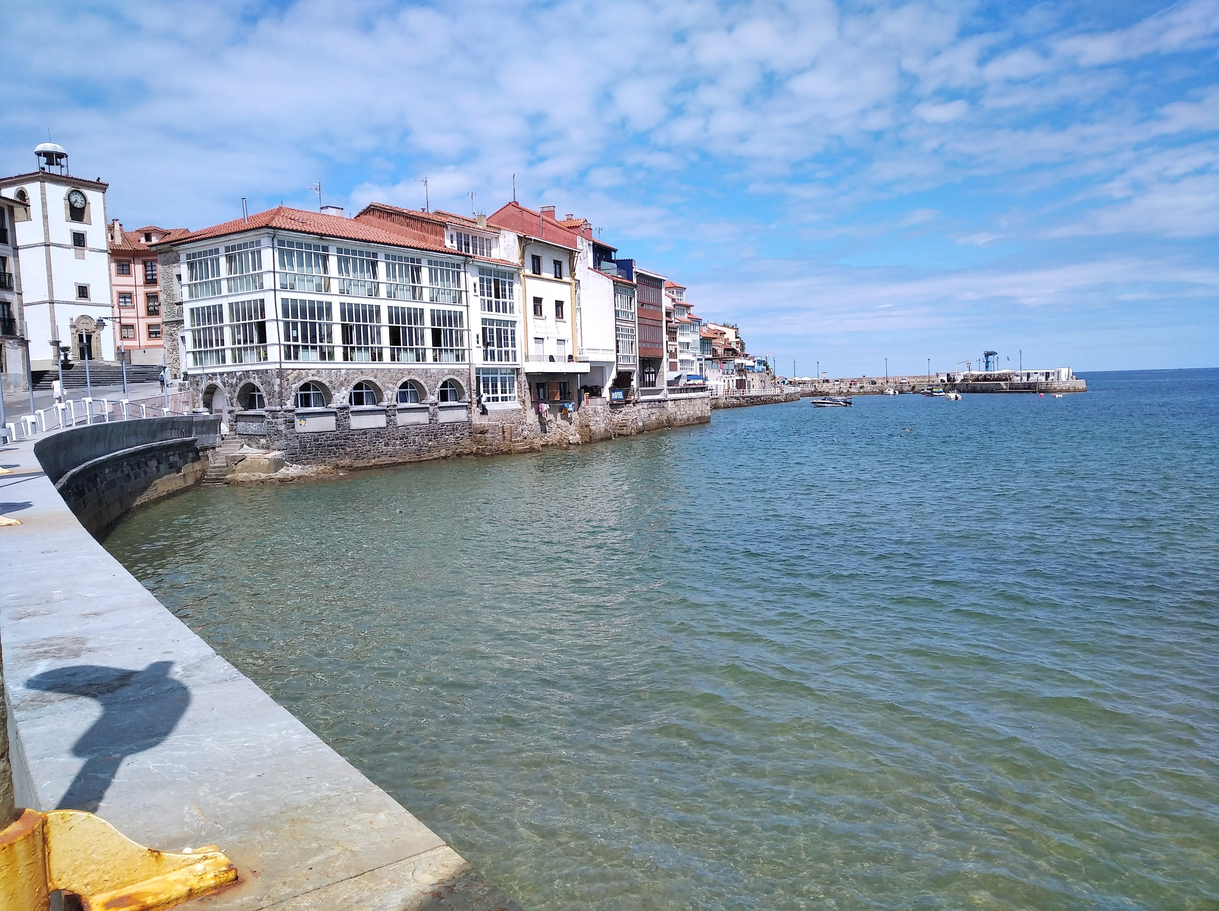 Casas en La Ribera de Luanco, Asturias, España